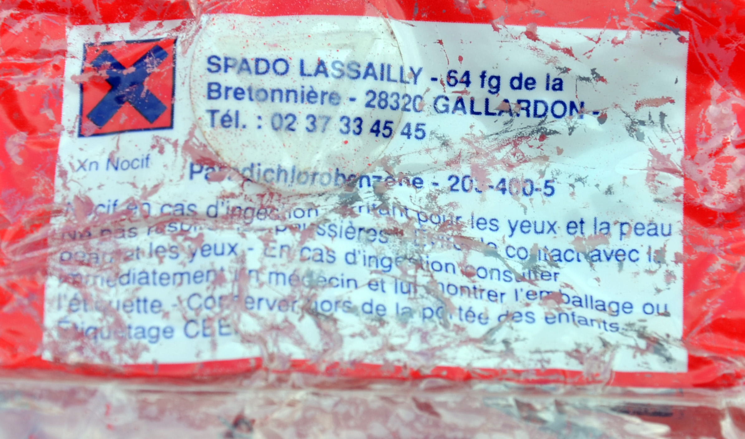 exemple d'étiquette de sachet ancien de blocs antimites fait de paradichlorobenzène